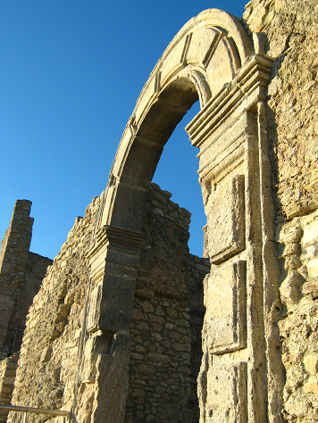 Arco castello di Cleto